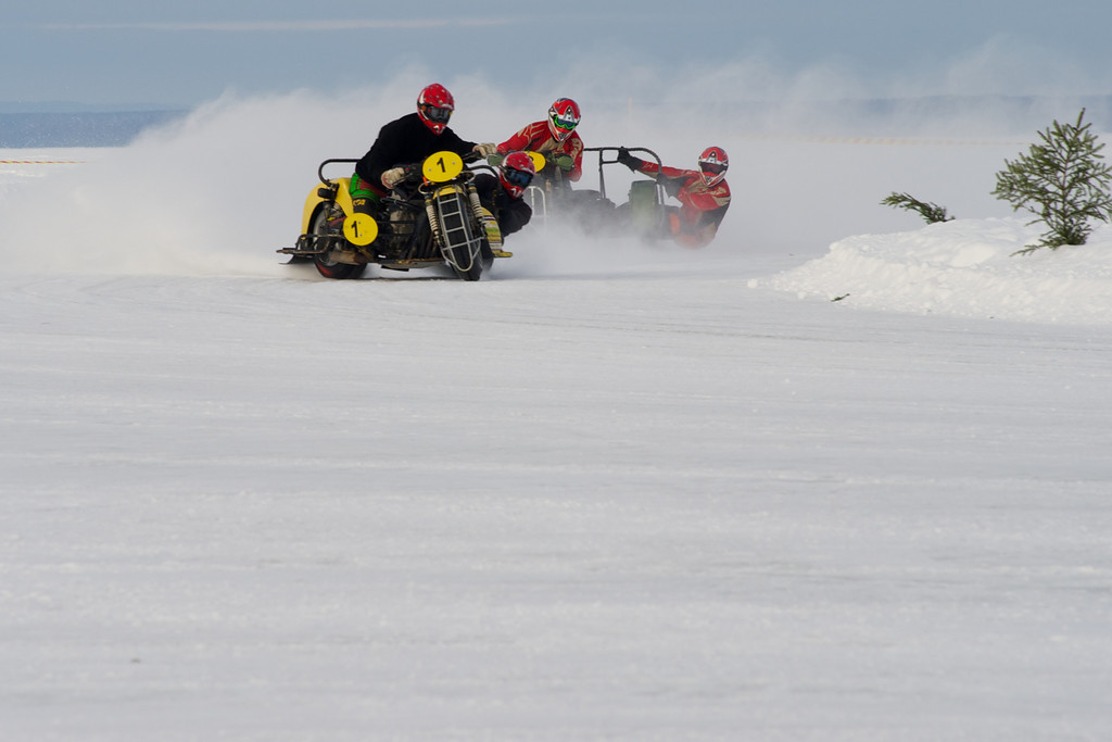 SM i Isbana vid Årsunda (2011-02-20) MCS